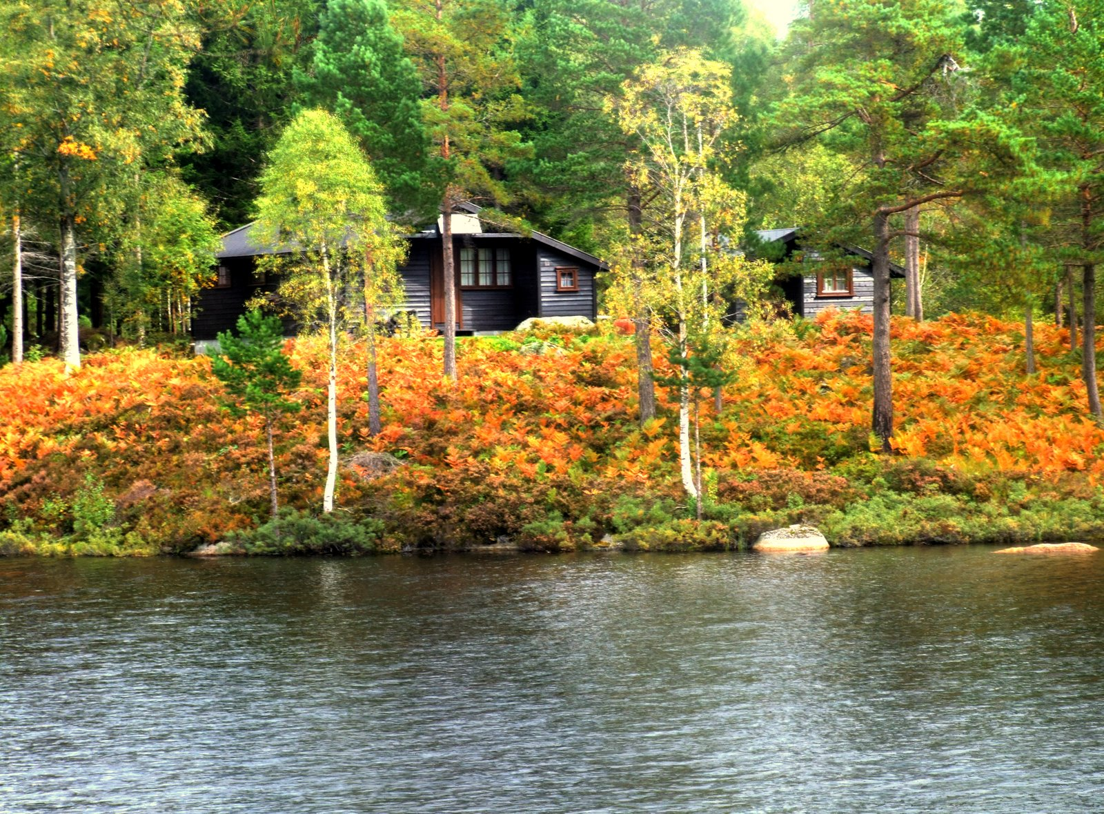 Finsland